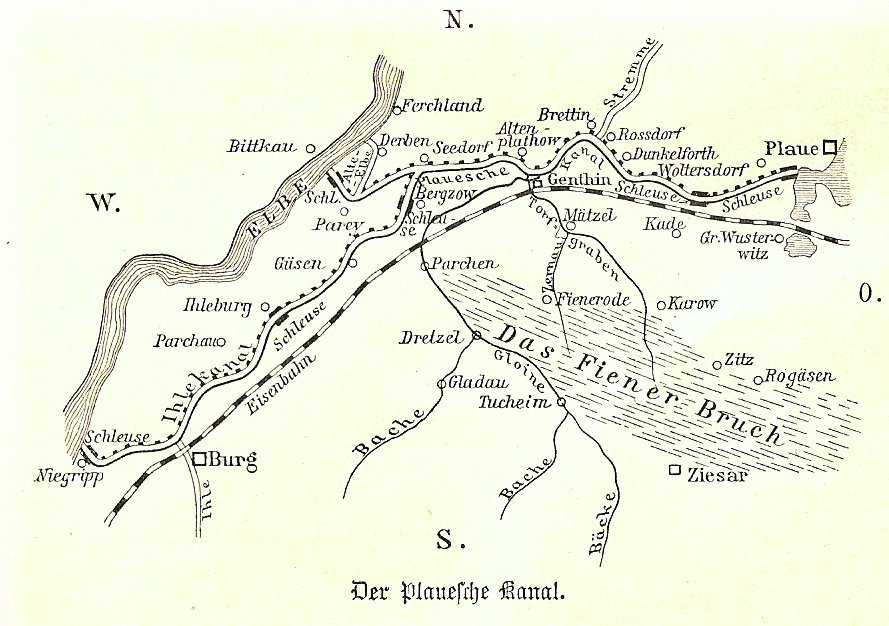 Der Plauer Kanal um 1900